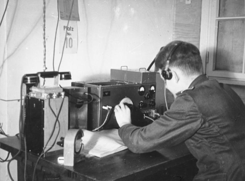 Ob er wohl kommt?